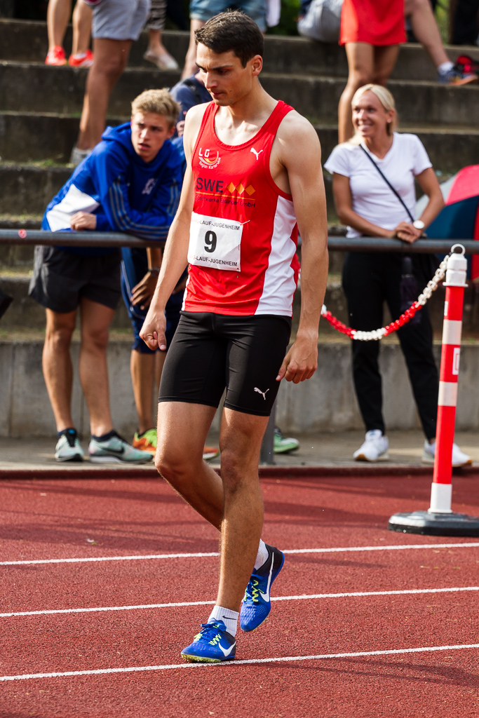 Laufgala des TSV Pfungstadt am 3. Juni 2017.